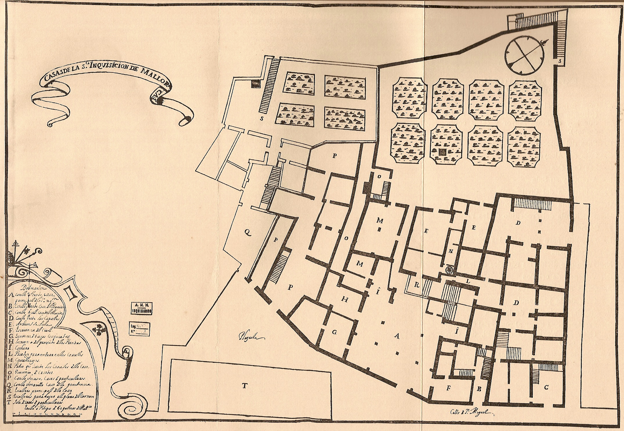 Planol de la seu de la Inquisició de Mallorca edificada amb les confiscacions dels judaitzants mallorquins cap a 1678